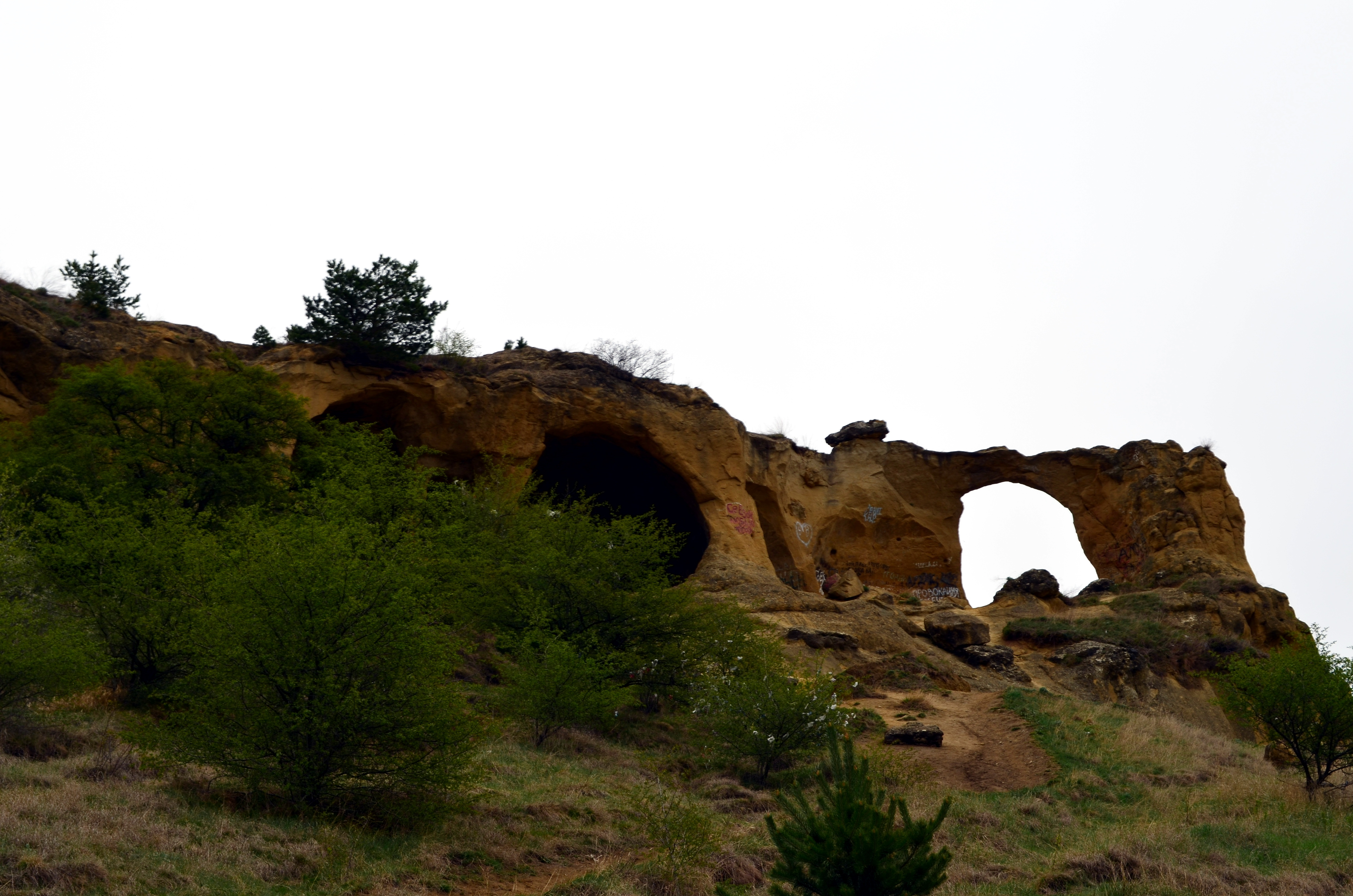 Гора Кольцо: Северная окраина г. Кисловодска, отрог южного склона хр. Боргустан, Кисловодск, Ставропольский край This image is related to the protected area of Russia number 2610067